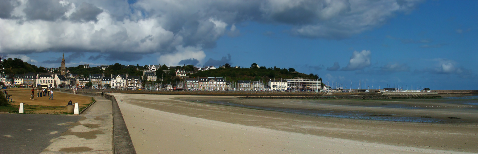 Binic, Côtes-d’Armor, Bretagne, France.